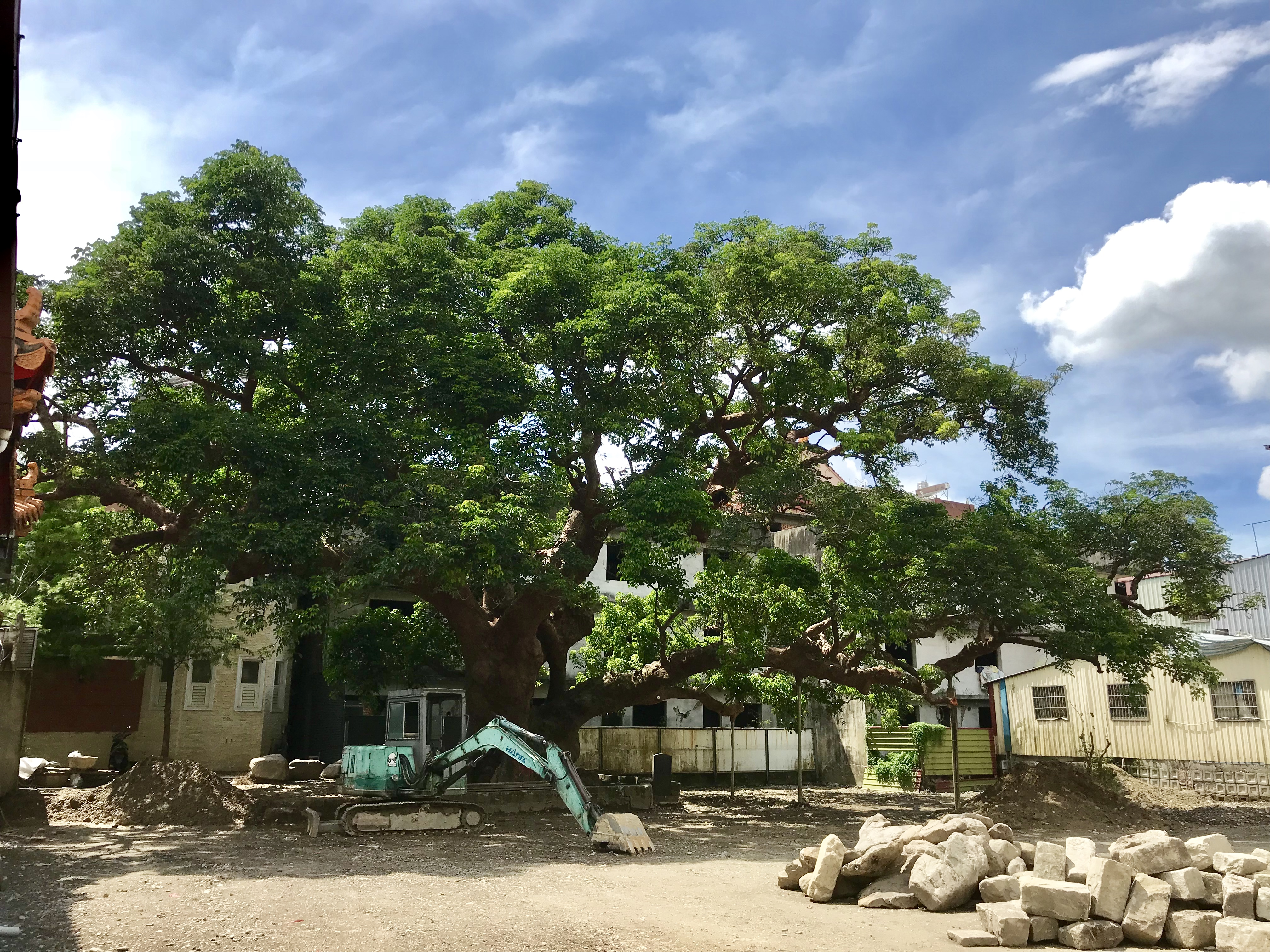 中文（台灣）: 整地醫療中的埔里茄苳樹王公。